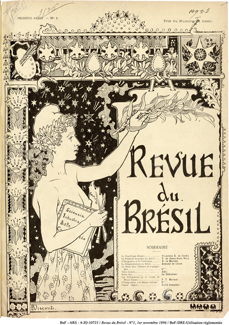 Capa para o primeiro número da Revue du Brésil - 1896